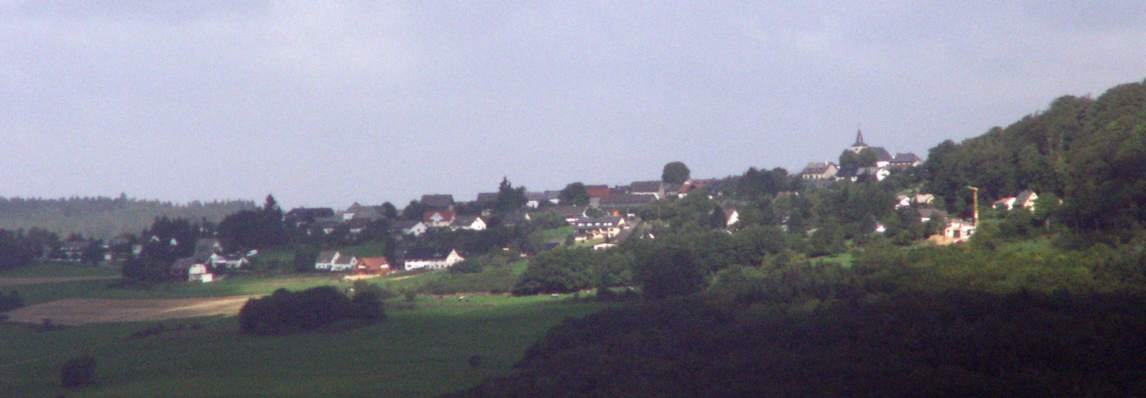 Ortschaft Aremberg/Eifel.